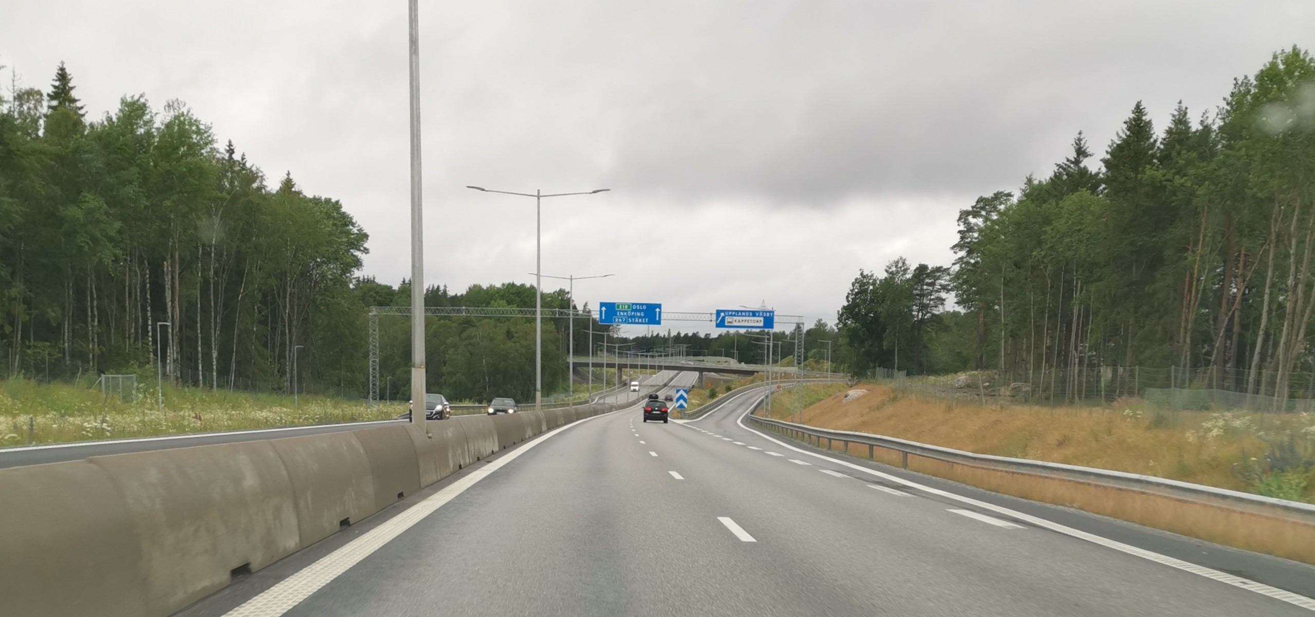 Riktning mot Järfälla och E18. Fotad Juli 2020.